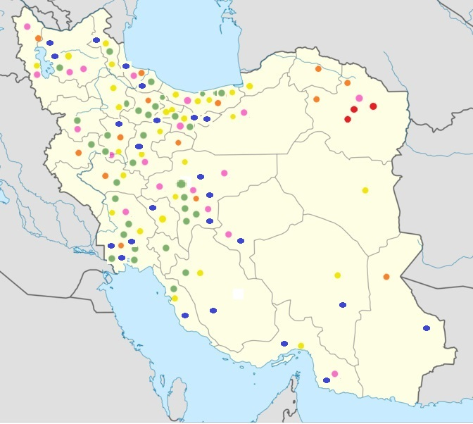 18 Iranian protests 1 January